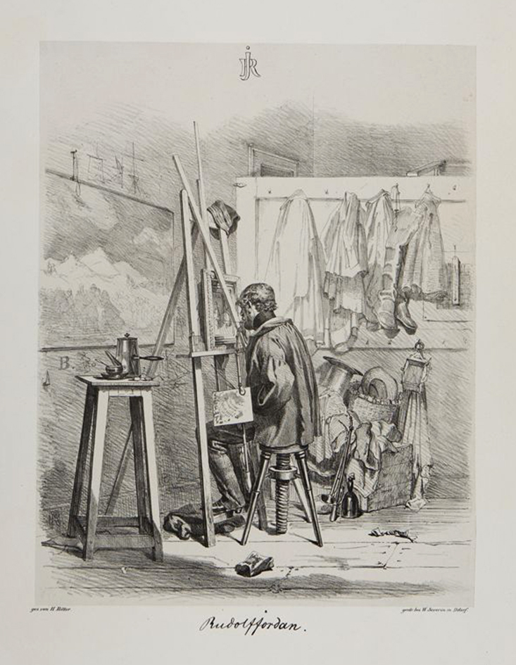 Rudolf Jordan in seinem Atelier, Paar in einem Innenraum malend, Illustration von Henry Ritter in Schattenseiten der Düsseldorfer Maler, 1845